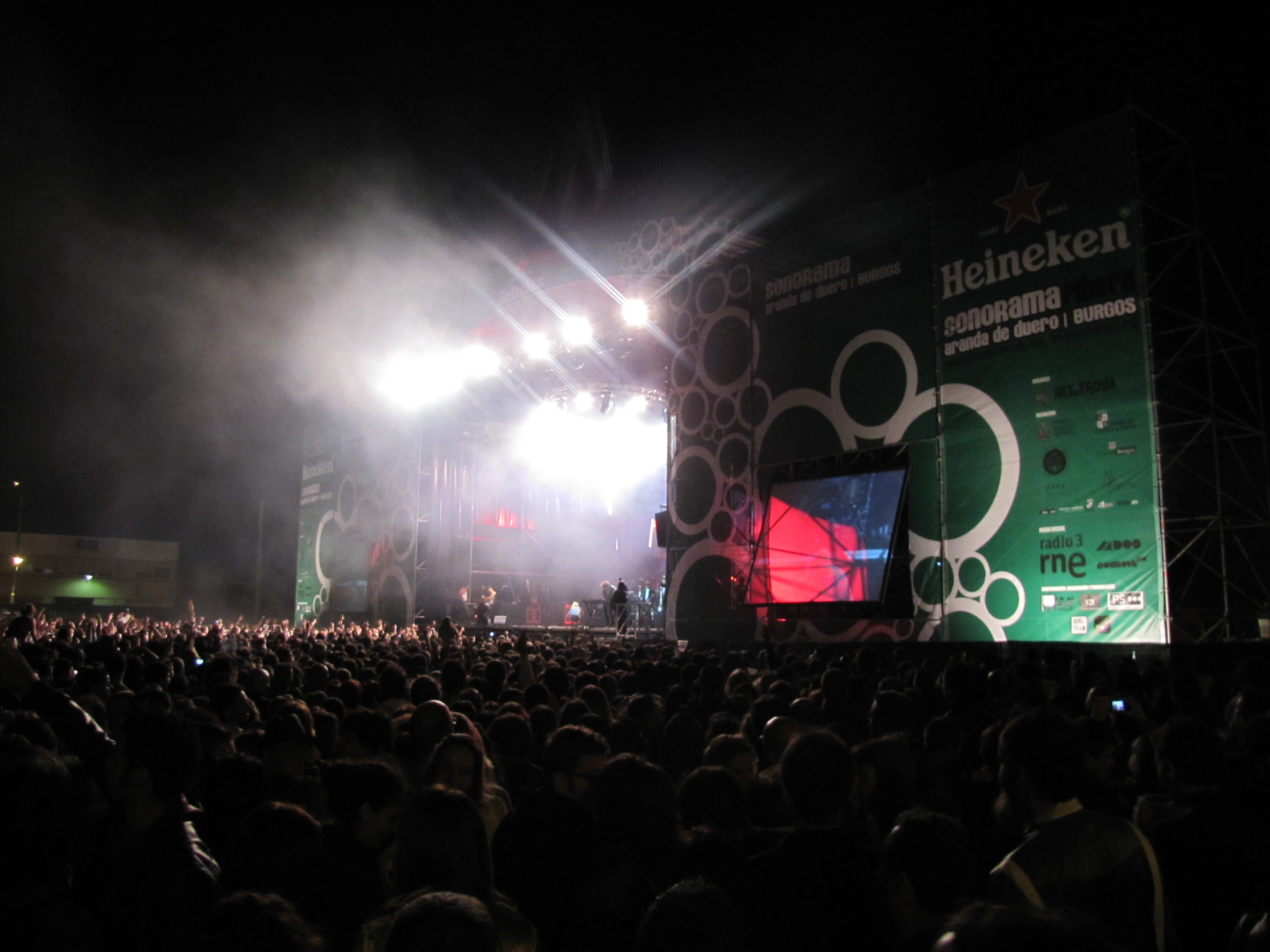 Concierto de The Sounds, en el Festival Sonorama 2010, en Aranda de Duero, Burgos, España.